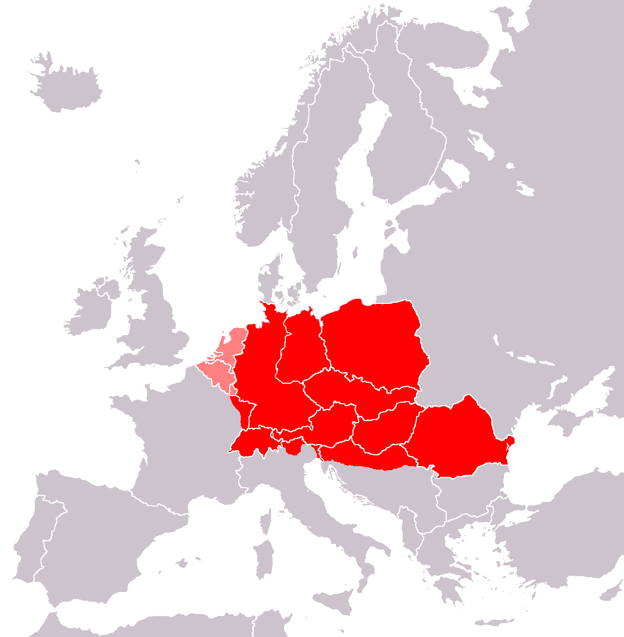 Central Europe according to Mayers Enzyklopädisches Lexikon, Band 16, Bibliographisches Institut Mannheim/Wien/Zürich, Lexikon Verlag 1980: Mitteleuropa: Teil Europas, umfasst etwa das Gebiet der Staaten Niederlande, Belgien, Luxemburg, BRD, DDR, Polen, Schweiz, Österreich, Tschechoslowakei, Ungarn und Rumänien, die nördlichen Randlandschaften Italiens und Jugoslawiens sowie die nö. Randgebiete Frankreichs. Verschiedentl. werden die Niederlande, Belgien und Luxemburg nicht zu Mitteleuropa gerechnet.